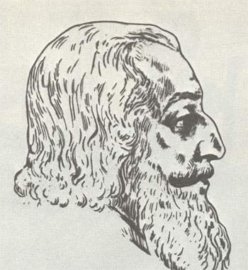 Ponori Török Aurél antropológus rajza III. Béla fejéről